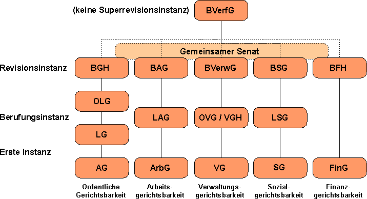 Gerichtsorganisation in Deutschland (Makroebene) Autor: C.Löser Erstellt mit: de: Draw